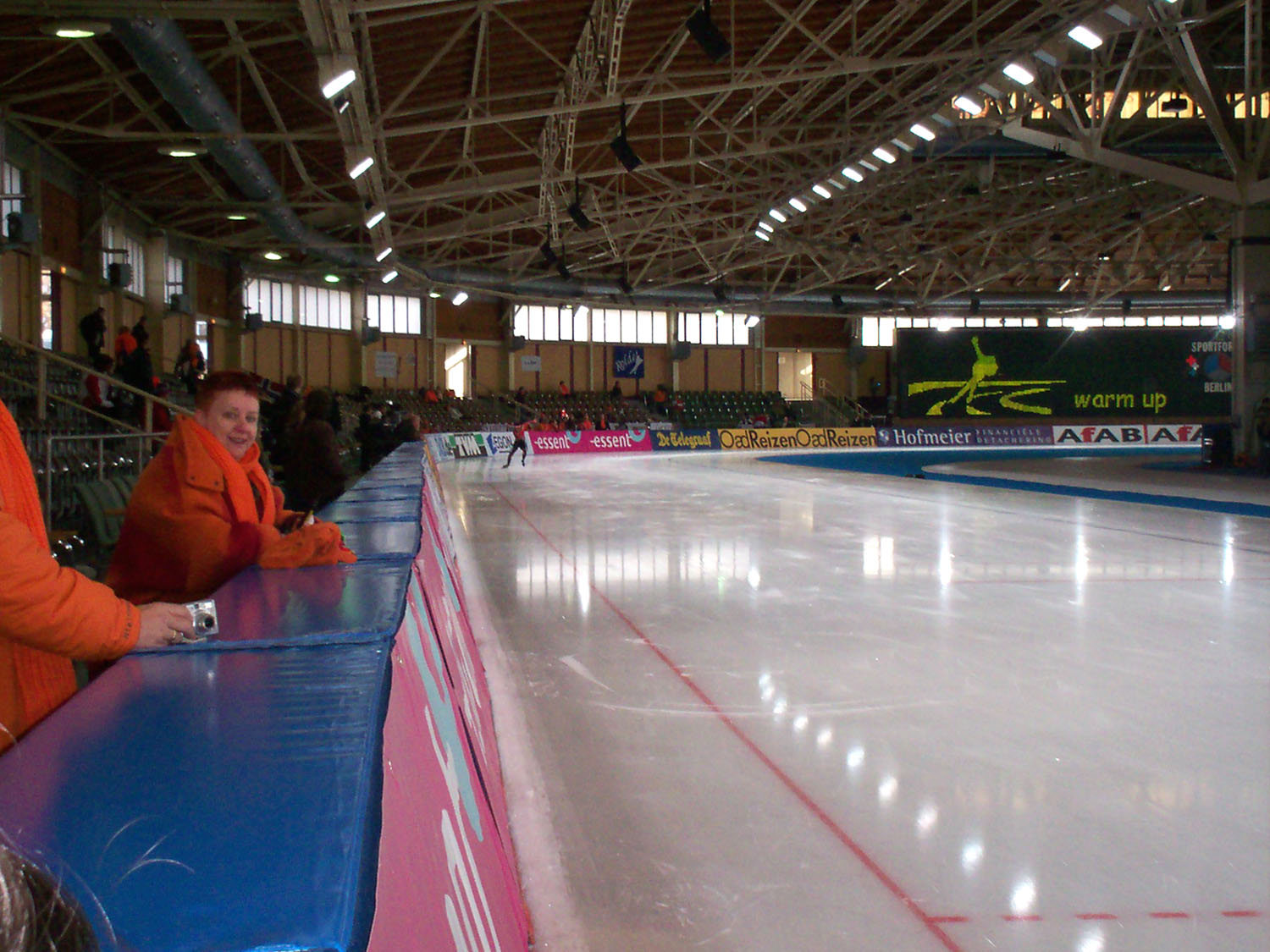 Eisschnelllauf Mehrkampf WM 2008 in Berlin, Deutschland.